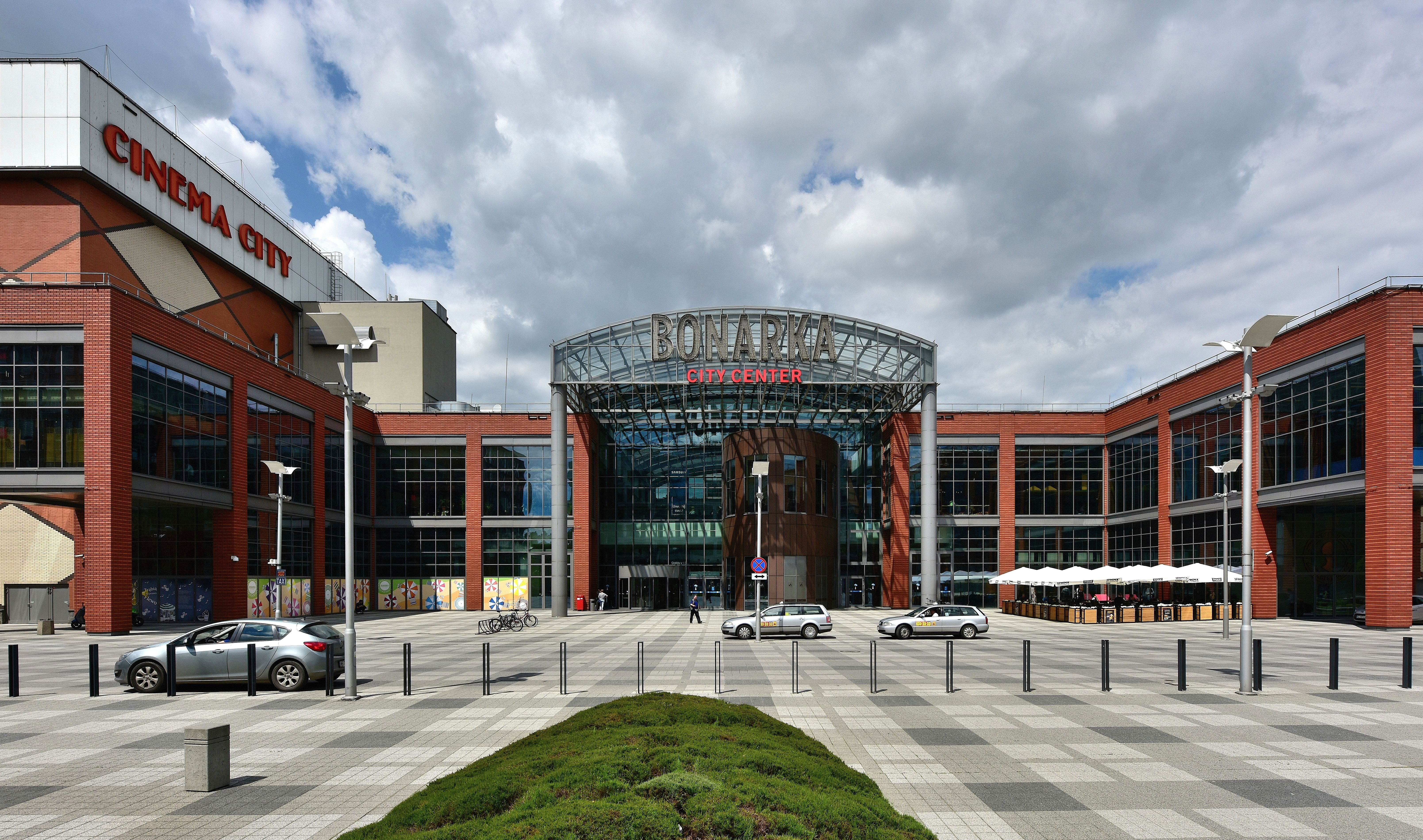 Centrum handlowe Bonarka City Center w Krakowie (od strony ul. Puszkarskiej)